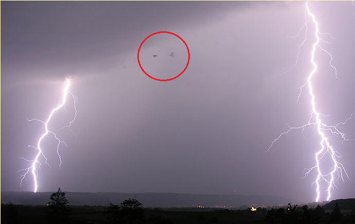 Effet stroboscopique sur un oiseau. Mis en évidence par un cercle.